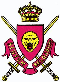 Wahlspruch Im Rahmen des NATO-Verteidigungsplans wurde Belgien ein sechzig Kilometer breiter Sektor zugewiesen. Das 1. Belgische Armeekorps bildet ein Schild zum Schutze der belgischen Staatsbürger. Diesen Auftrag findet man daher auch in dem Wahlspruch auf dem Wappen "SCUTUM BELGARUM", was "Schild der Belgier" bedeutet. Gekreuzte Schwerter Mit vereinten Kräften, den zwei gekreuzten Schwertern, wird der Durchgang all denen versperrt, die nicht willkommen sind. Die Schwerter symbolisieren, zusammen mit dem Schild, das wirksame Verteidigungsglied innerhalb der NATO, das für die Abwendung jeglicher militärischer Bedrohung bürgt. Der Löwenkopf Während ihrer Vorbereitungsphase in Großbritannien nimmt die Brigade PIRON zum ersten Male den goldenen Löwenkopf in ihr Wappen auf. Diesen Löwenkopf findet man heute auf dem Wappen des 1. Belgischen Armeekorps wieder.